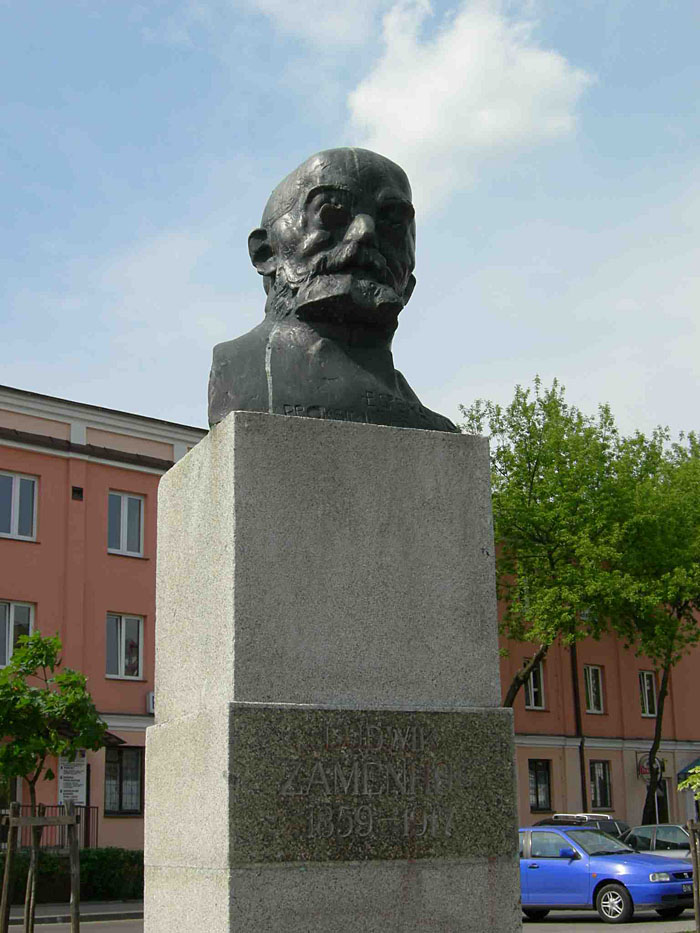 Statue de Zamenhof à Białystok